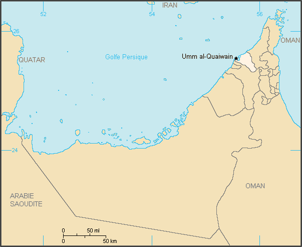 Description:Carte de l'émirat d'Umm al-Quaiwain,Emirats arabes unis Auteur:Rémih